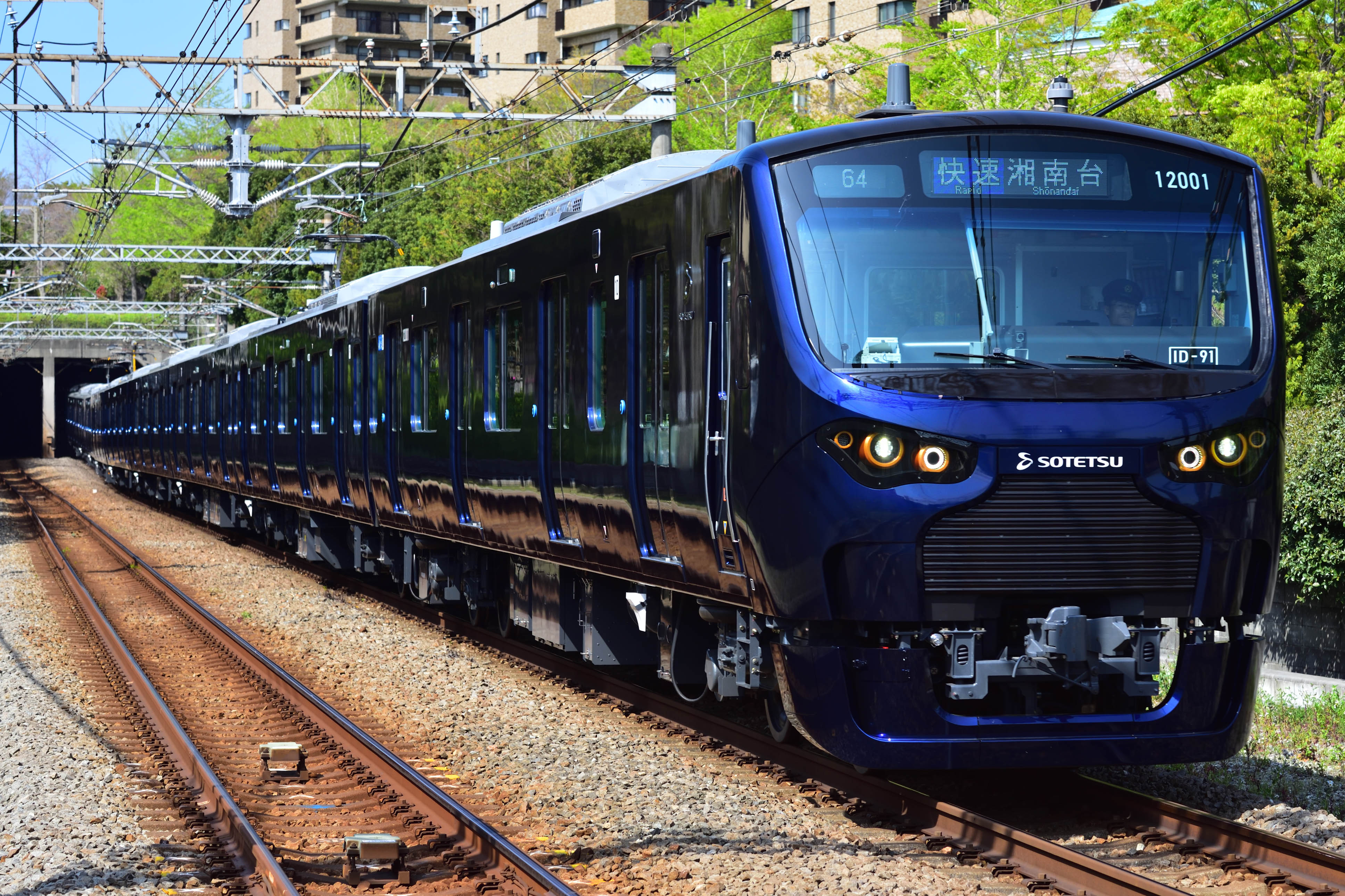 相鉄いずみ野線 12000系 緑園都市駅。Nikon D750